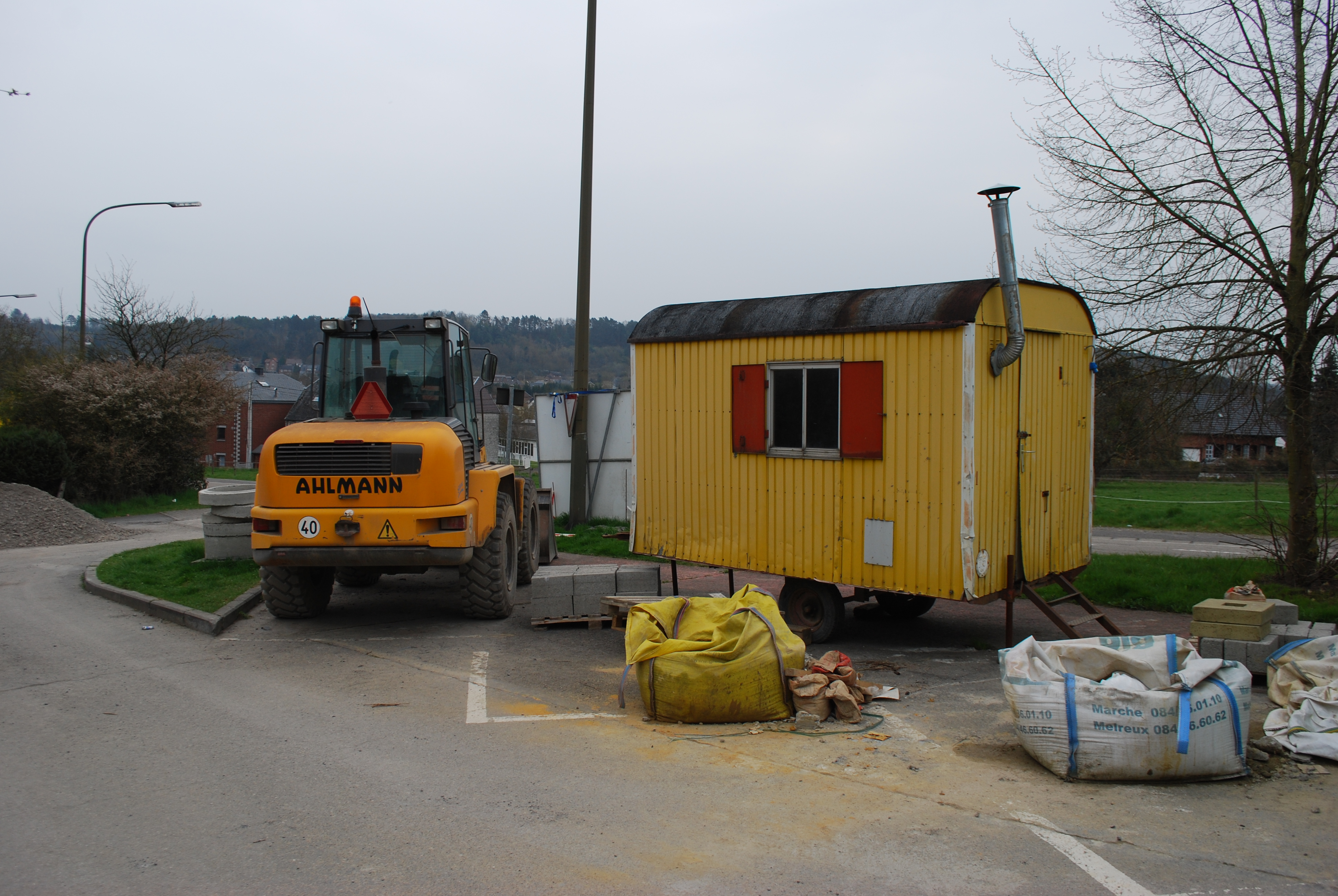 Vue de Barvaux.